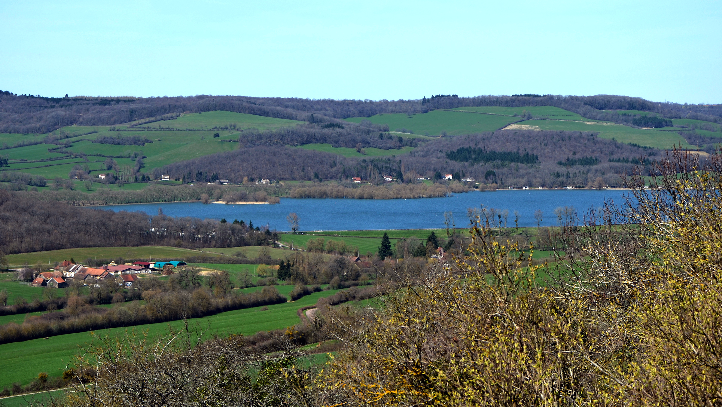 Réservoir de Panthier, Côte d'Or, France. Vue vers le nord-ouest depuis les environs du Crais Morlot au nord de Châteauneuf. Sur la gauche, le hameau des Bordes (Vandenesse-en-Auxois). Les maisons de l'autre côté du lac sont au pied du Petit Montot (la petite butte entièrement couverte d'arbres, ~420 m d'altitude, sur Créancey). A droite du Petit Montot, le Grand Montot (aussi entièrement couvert d'arbres, 446 m d'altitude, sur Semarey). le lac est à 376 m d'altitude.